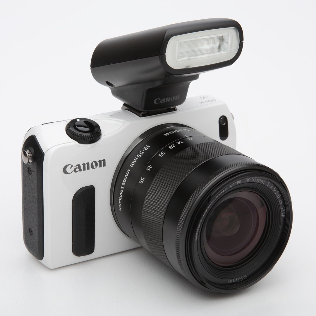 Canon EOS M in weiß mit EF-M 18-55mm f/3.5-5.6 IS STM und Speedlite 90EX